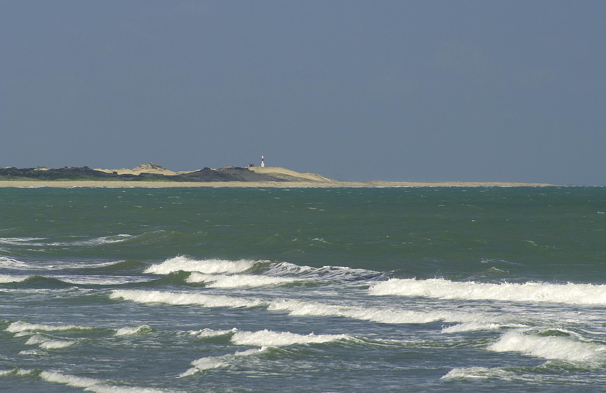 Praias de Luís Correia.